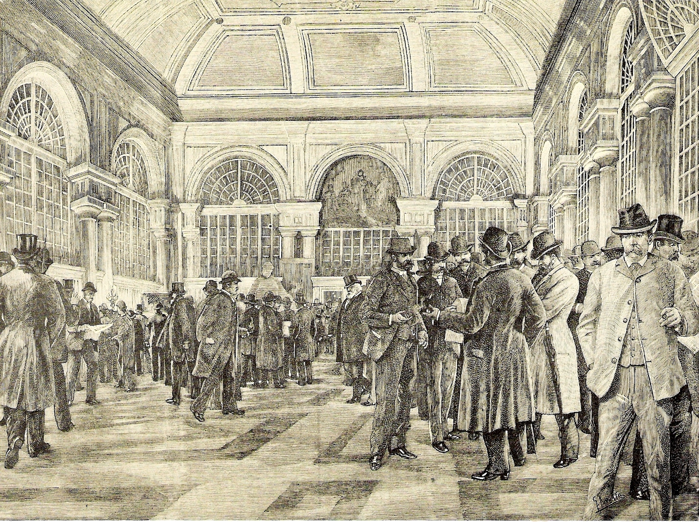 Incisione del XIX secolo raffigurante l'intero della Loggia dei Mercanti